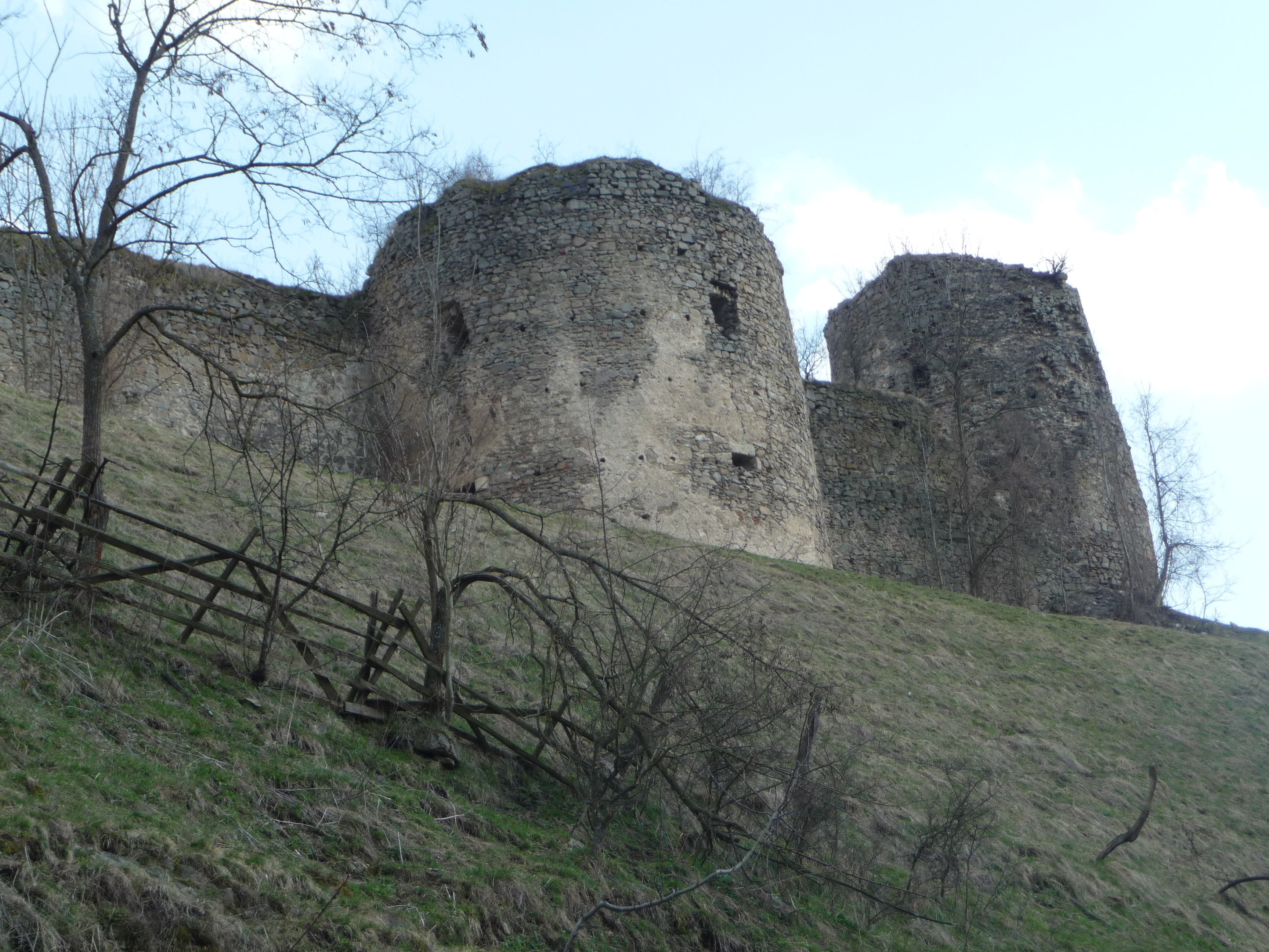 A sebesvári vár